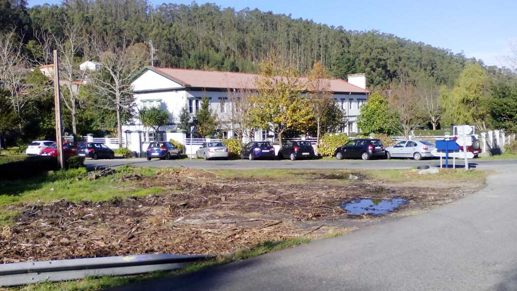 O Confurco.